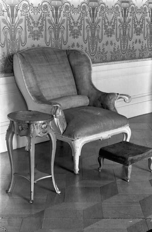 Potsdam.- Sanssouci, Sterbestuhl Friedrich des Großen im Schloß